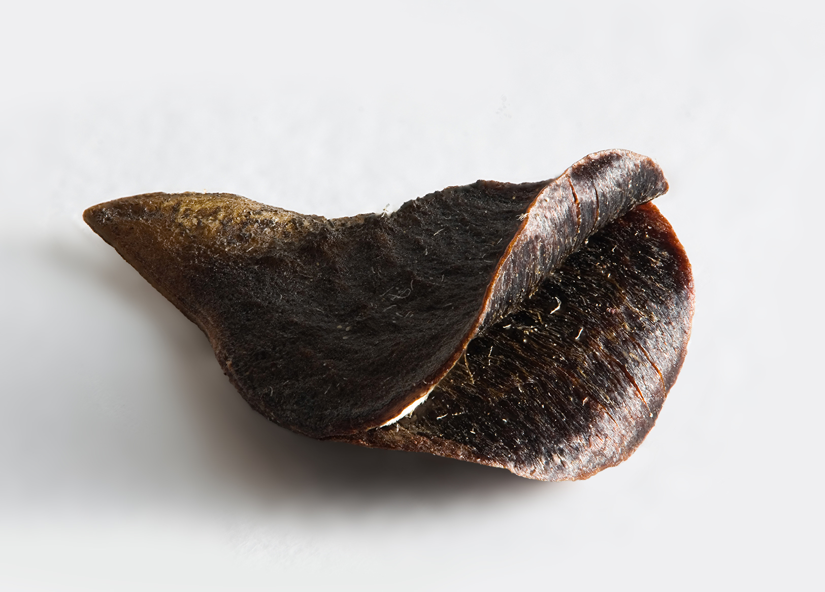 1.2 only